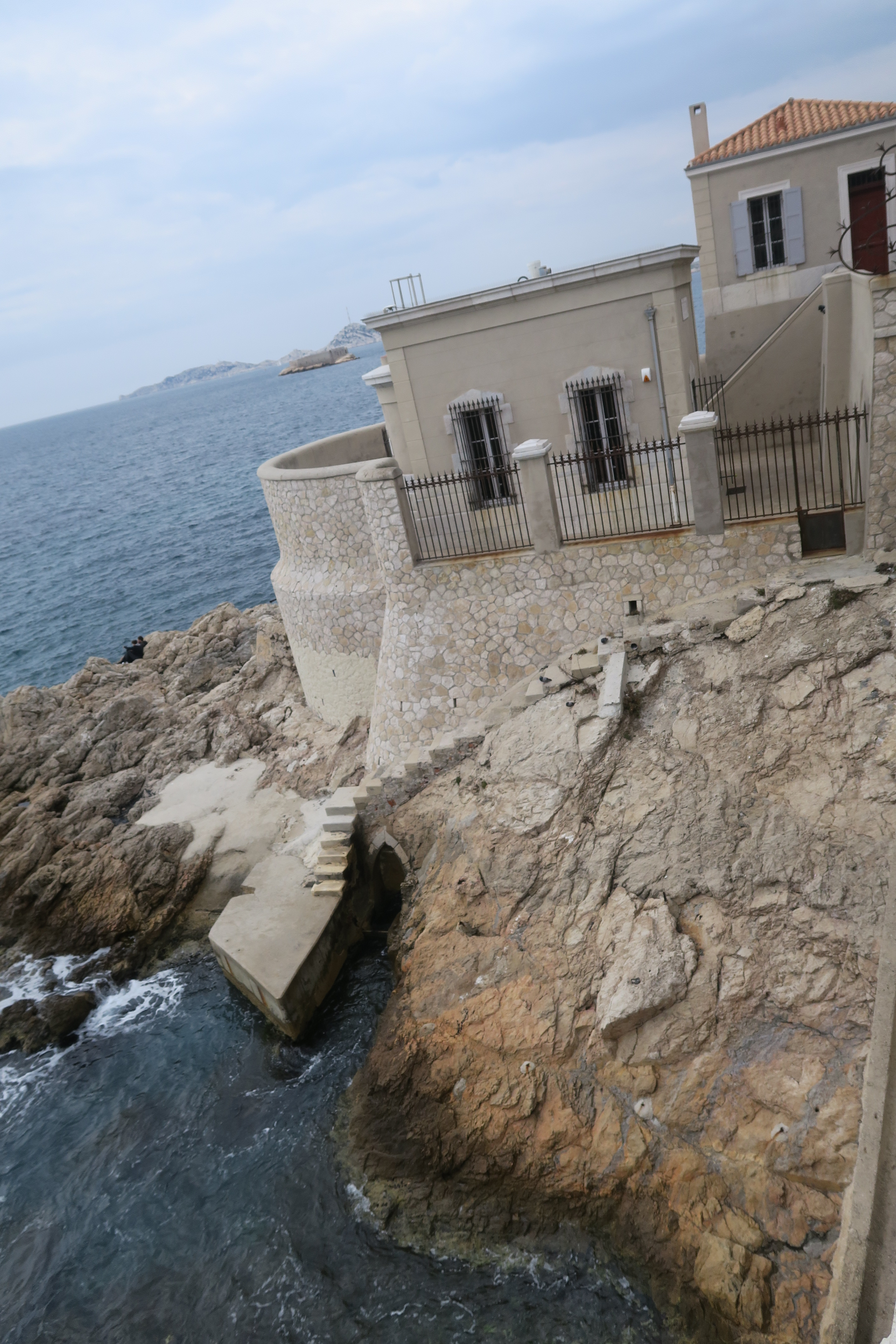 Le marégraphe de Marseille - mars 2018